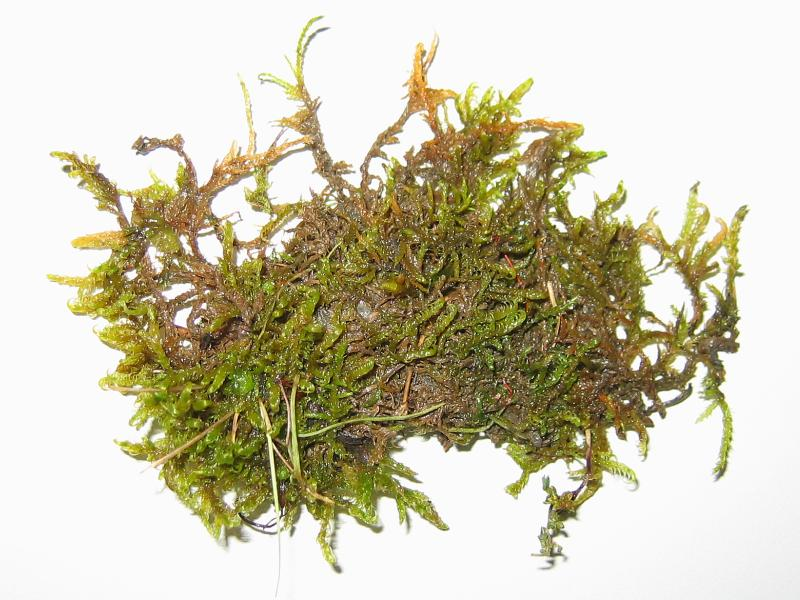 Bärlapp-Sichelmoos (Drepanocladus lycopodioides)